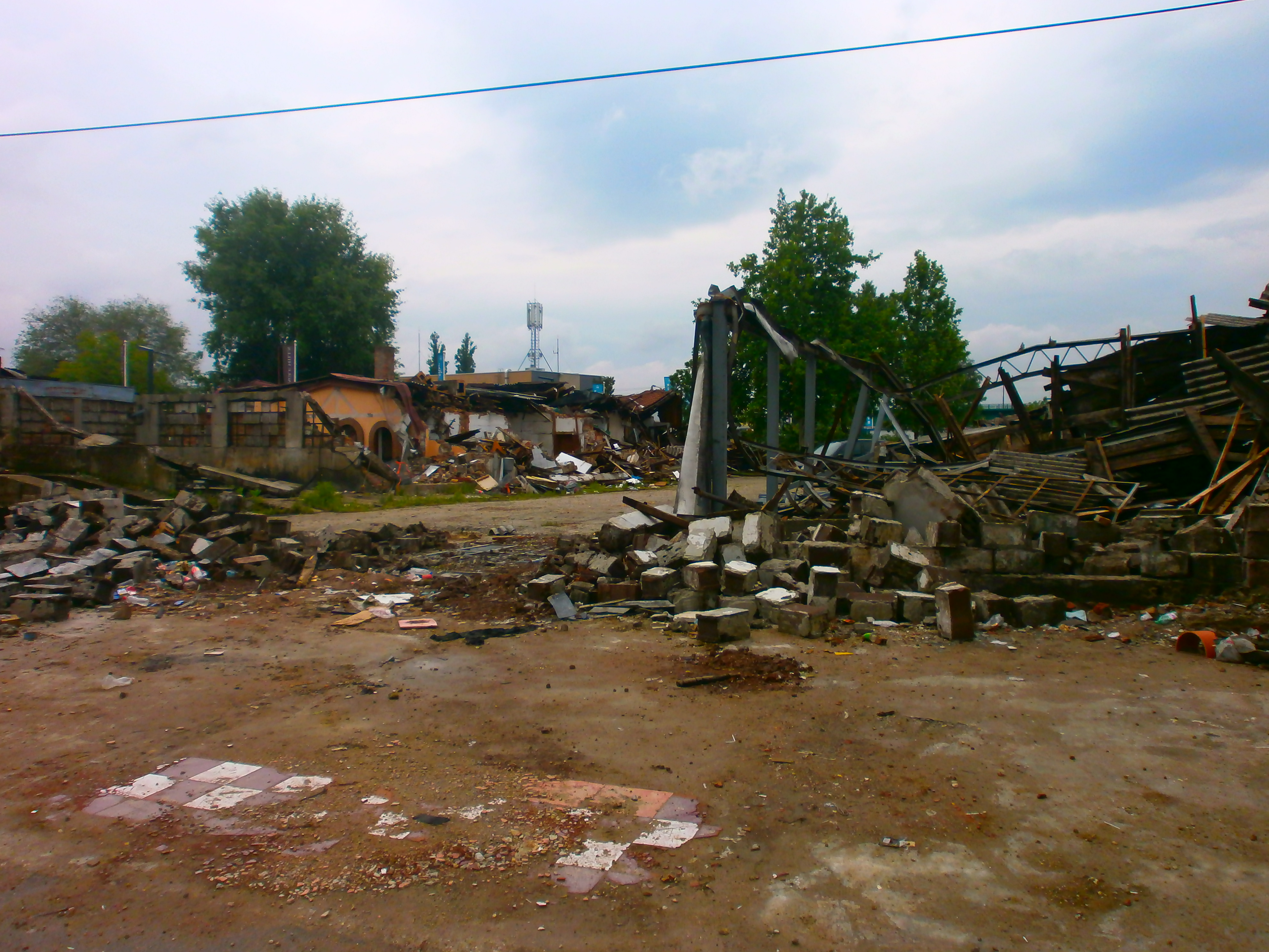 U noći između 24. i 25. aprila 2016. godine srušeno je više poslovnih objekata u beogradskoj četvrti Savamala. Bagerima su nepoznata lica srušila objekte u Hercegovačkoj ulici i ispod mosta Gazela.